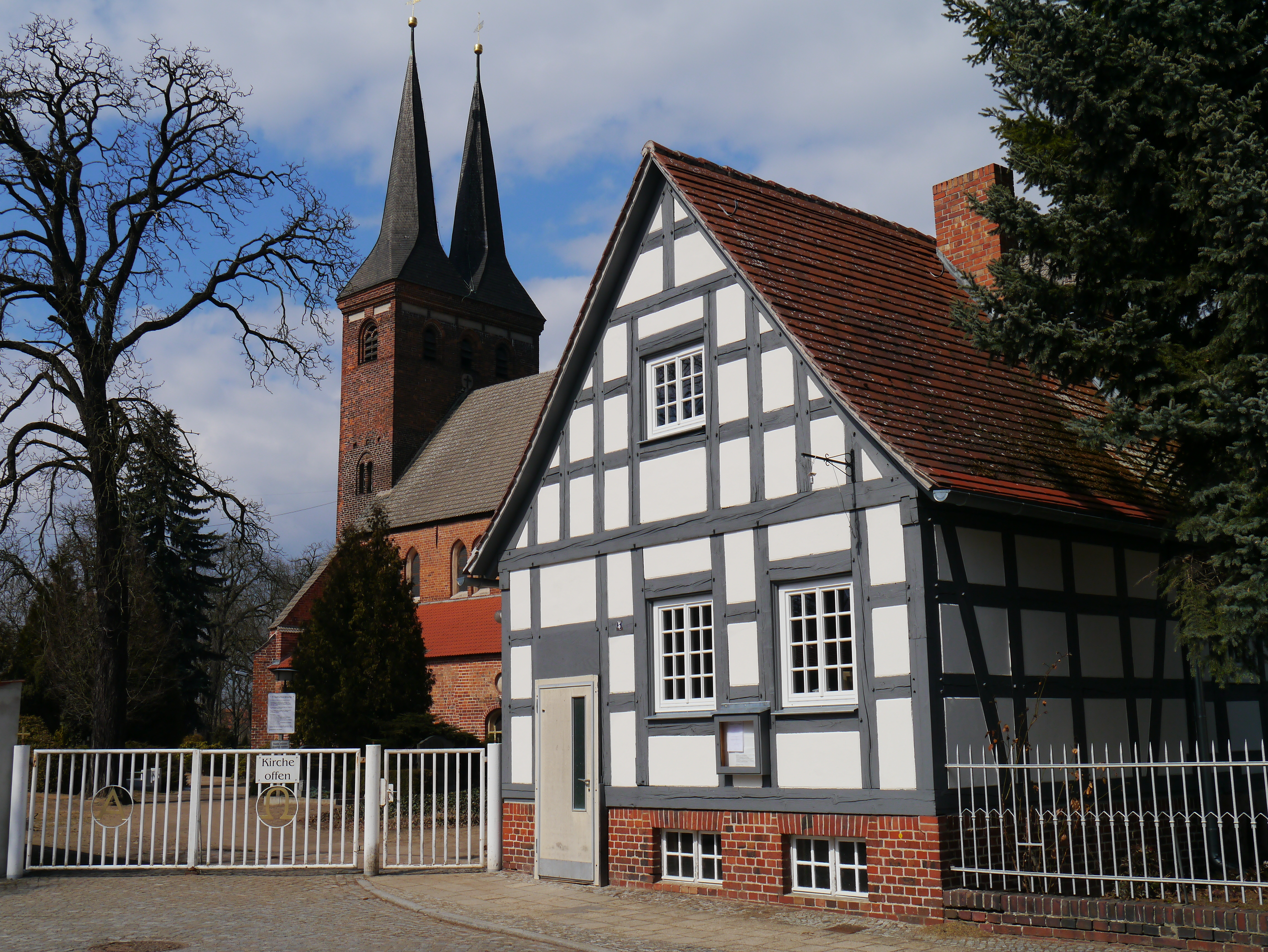 Ev. Stadtpfarrkirche Kirchhain, Doberlug-Kirchhain 2013.